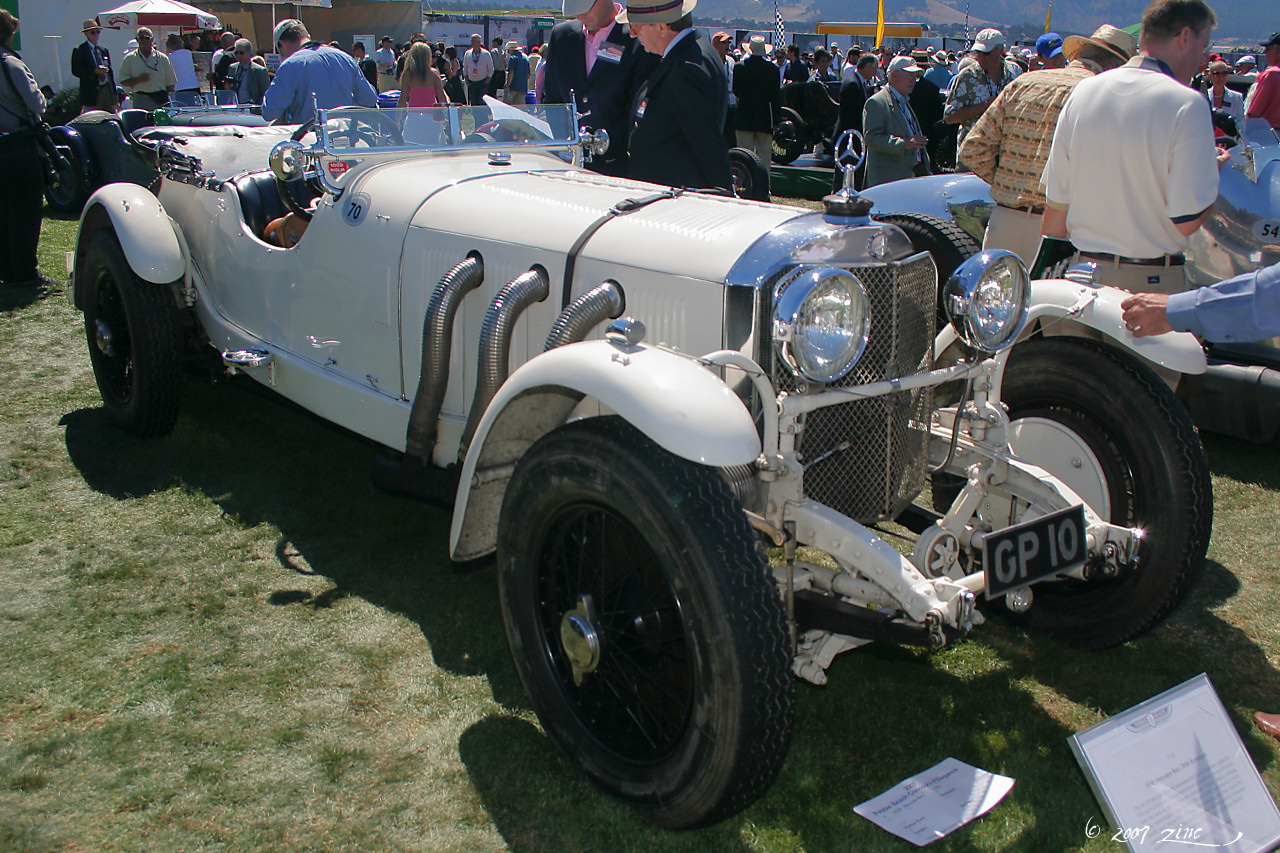 1930 Mercedes-Benz 710SS Rennsport